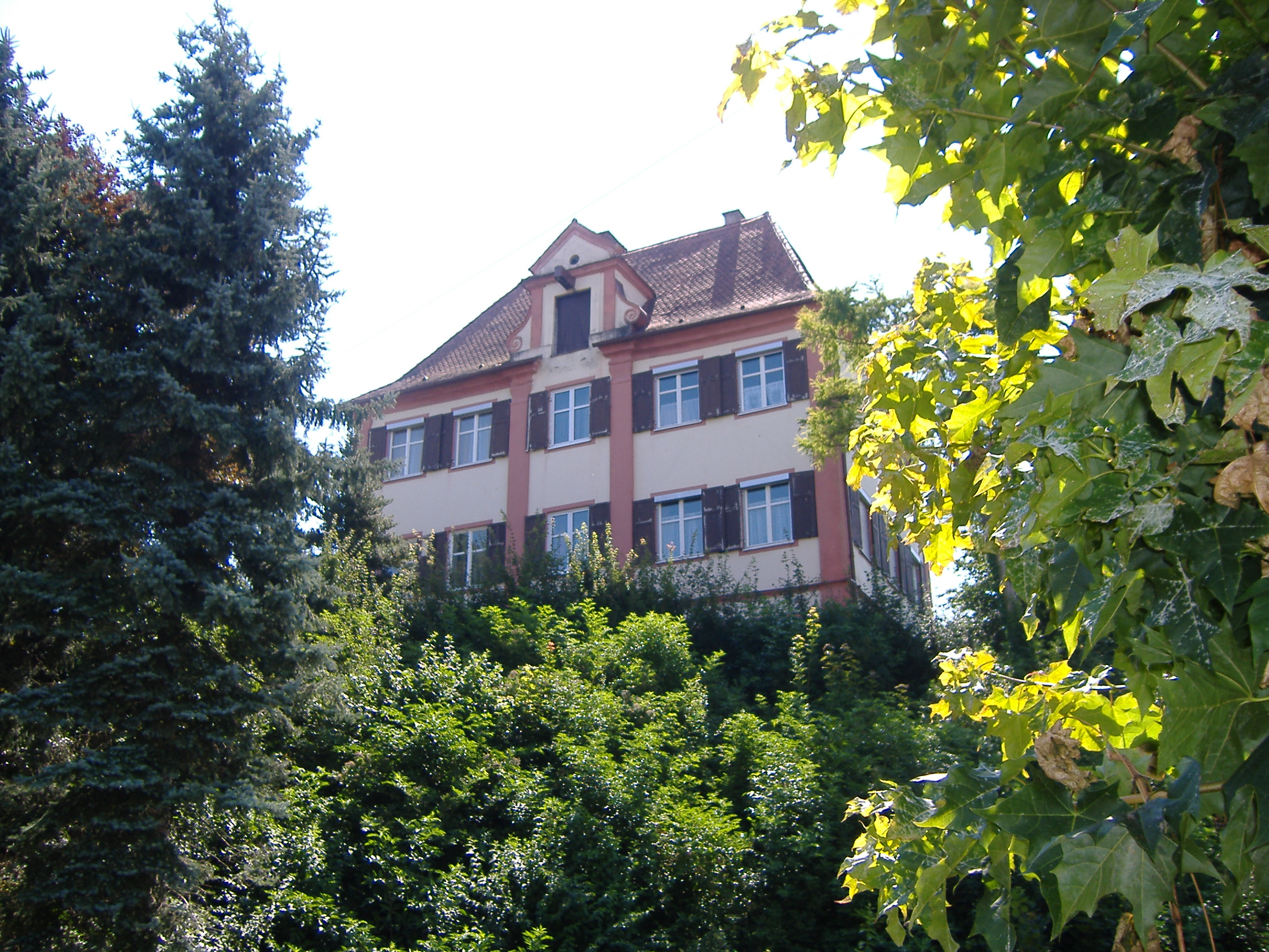 Schloss Großkötz